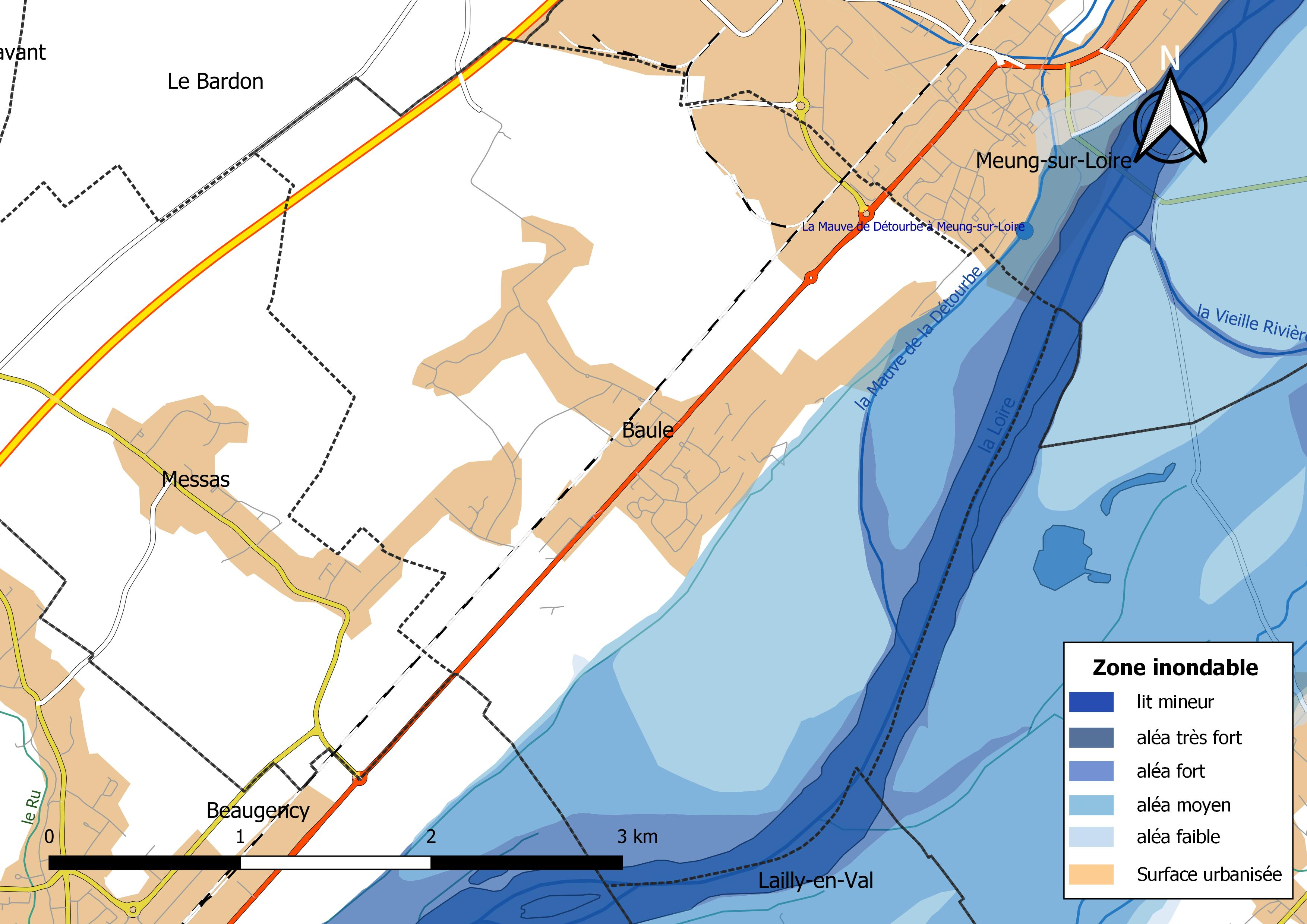 Zone inondable et réseaux hydrographique et routier de la commune de Baule (Loiret, France).